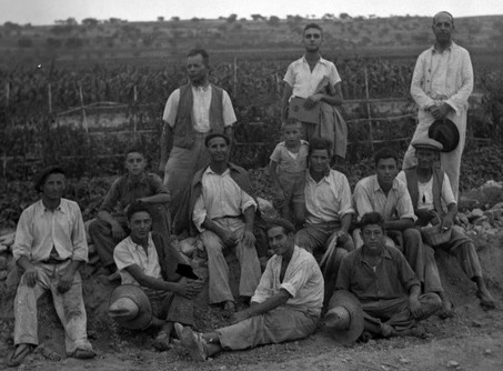 Grup de treball en l'Ereta del Pedregal (Navarrés). Dempeus, d'esquerra a dreta es troben Salvador Espí , Enric Pla i José Chocomeli. 1942 [ Arxiu Negatius - 1136]